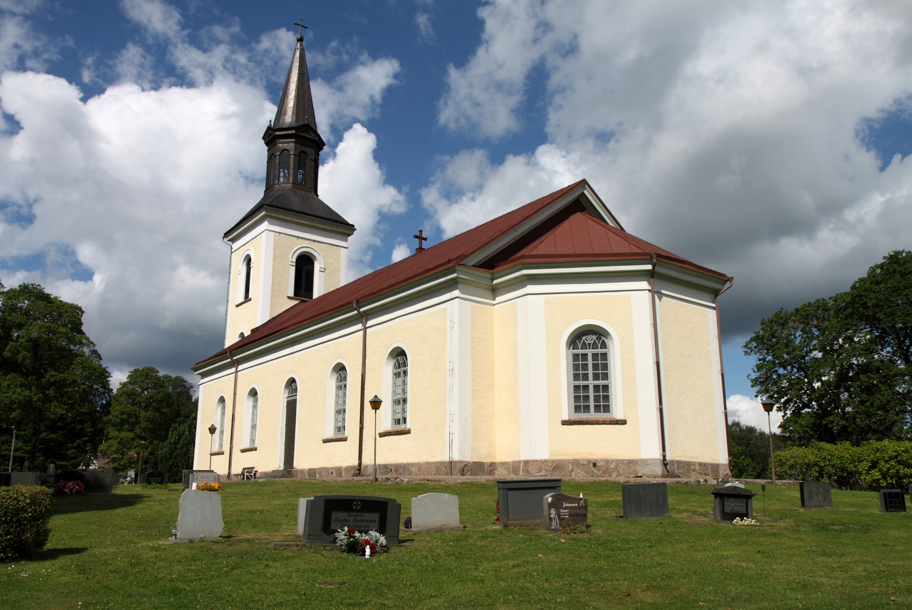 Blidsbergs kyrka.